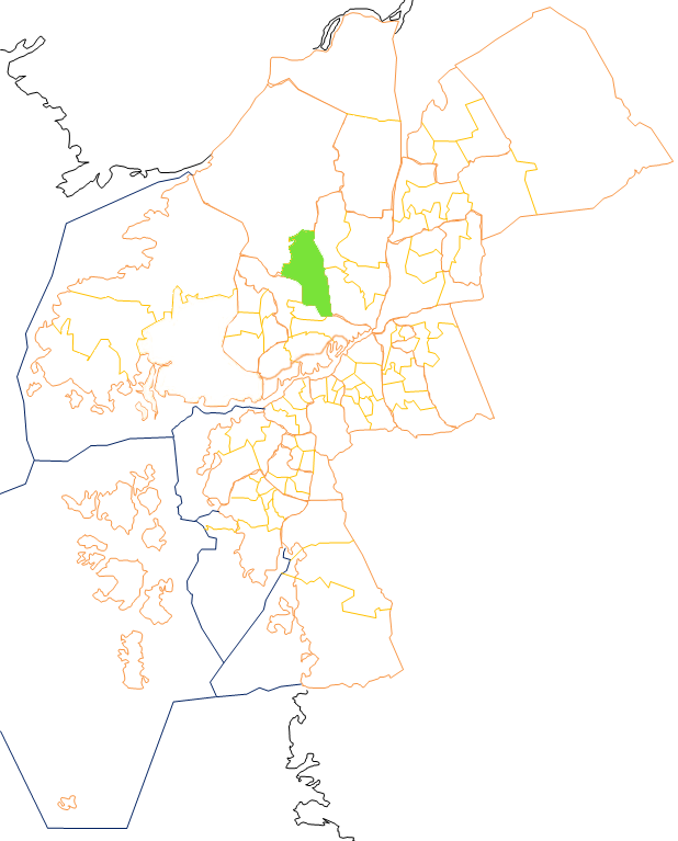 Karta som visar primärområdes belägenhet i Göteborg